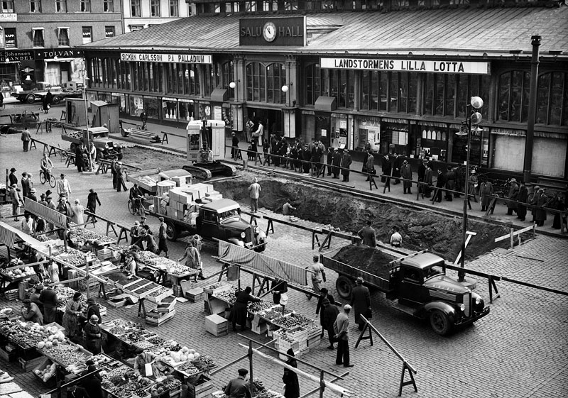 Skyddsrum byggs under Gamla Hötorgshallen/Saluhallen. Vy över torghandeln mot saluhallens fasad.